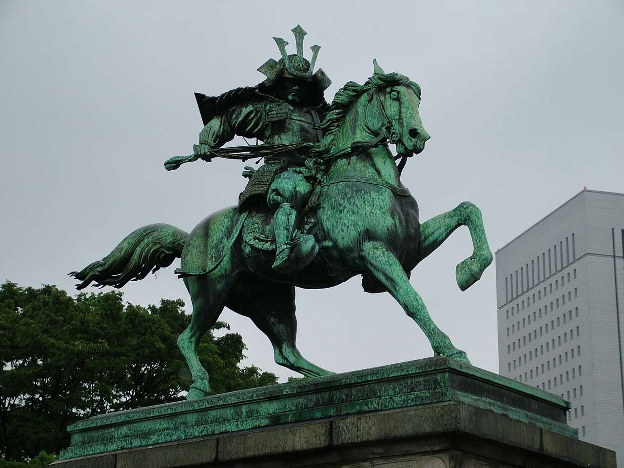 Kuszunoki Maszasige lovas szobra Tokióban